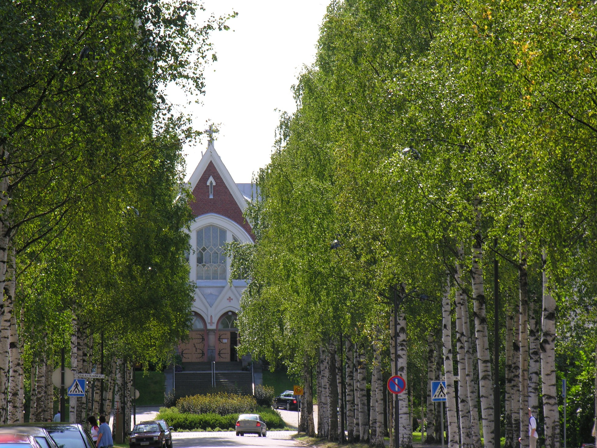 Йоэнсу, улица Кирккокату недалеко от Евангелическо-лютеранской церквиKirkkokatu, Joensuu, Finland